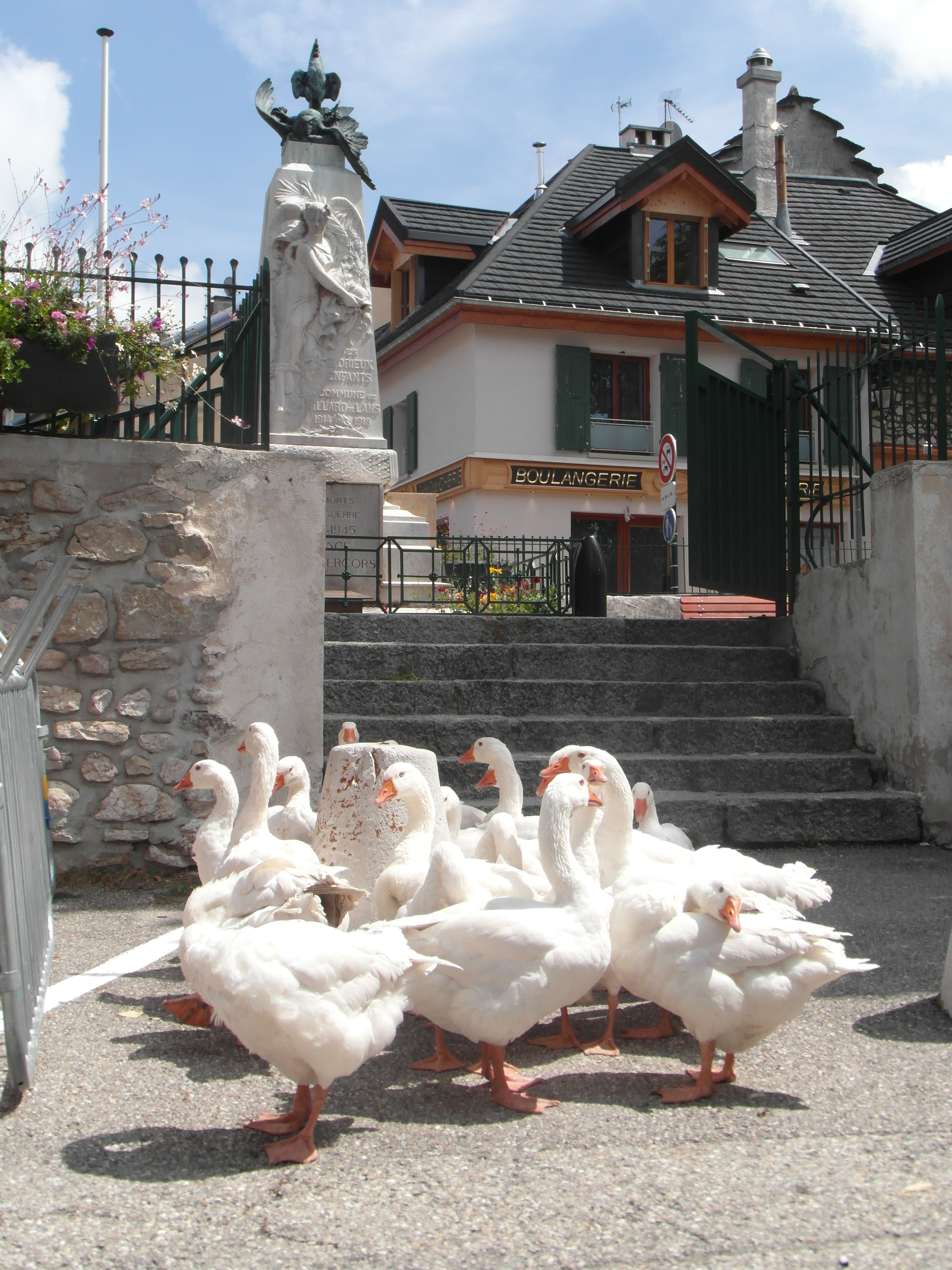 Troupeau d'oies devant le monument aux morts de Villard de Lans